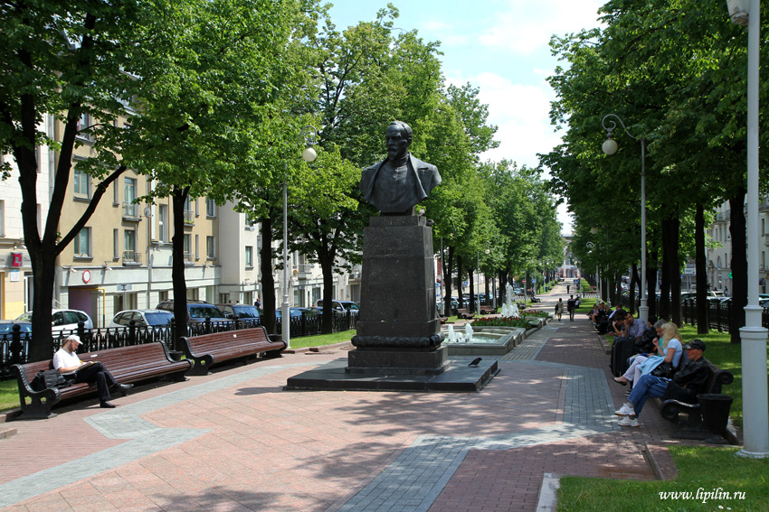 Мінск. Помнік Дзяржынскаму